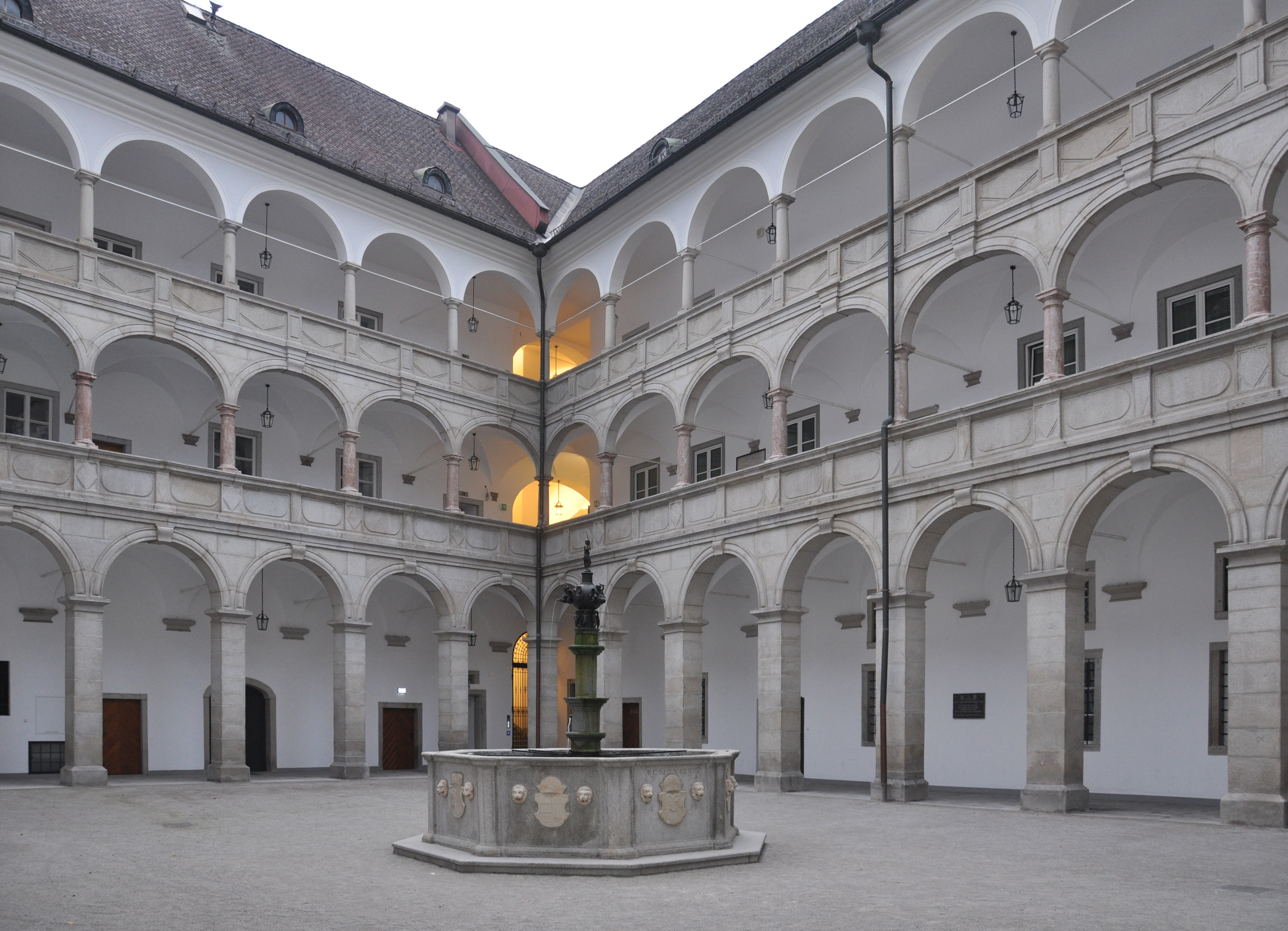 Linz, Landhaus, Innenhof mit Planetenbrunen